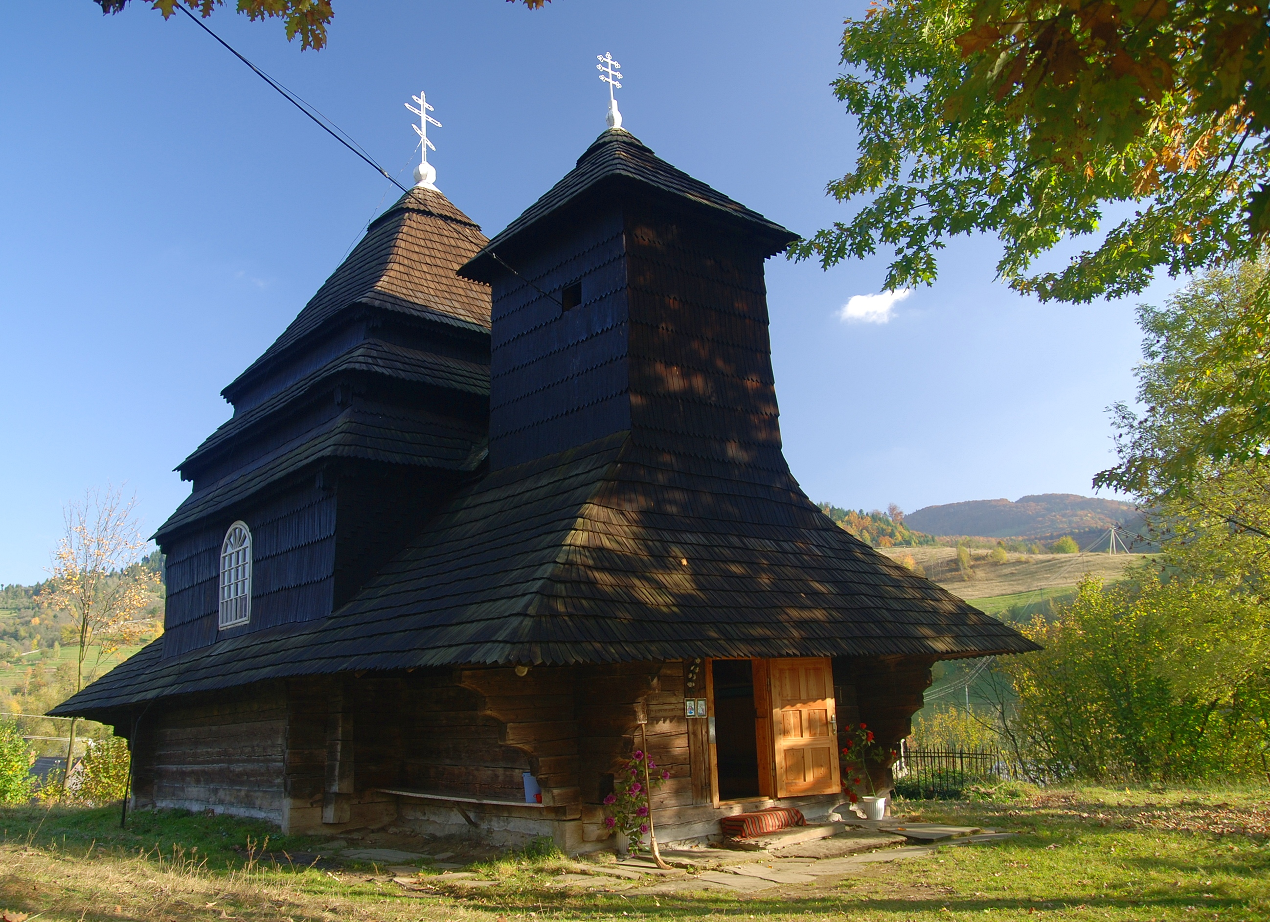 Михайлівська церква (дер.), Ужок